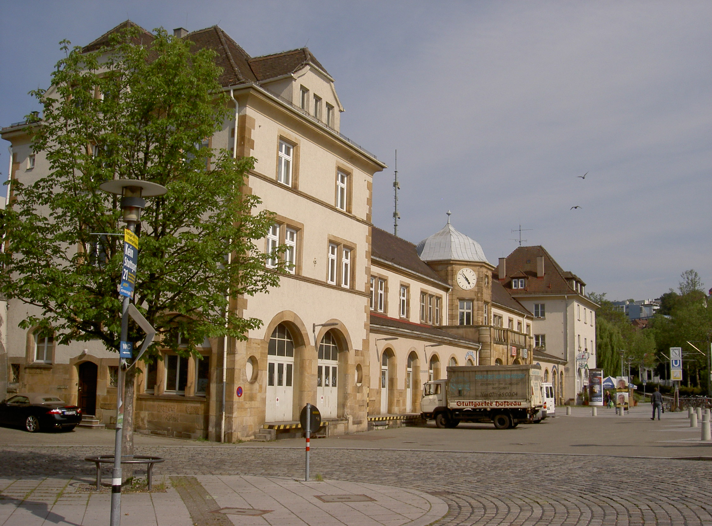 Empfangsgebäude des Feuerbacher Bahnhofs